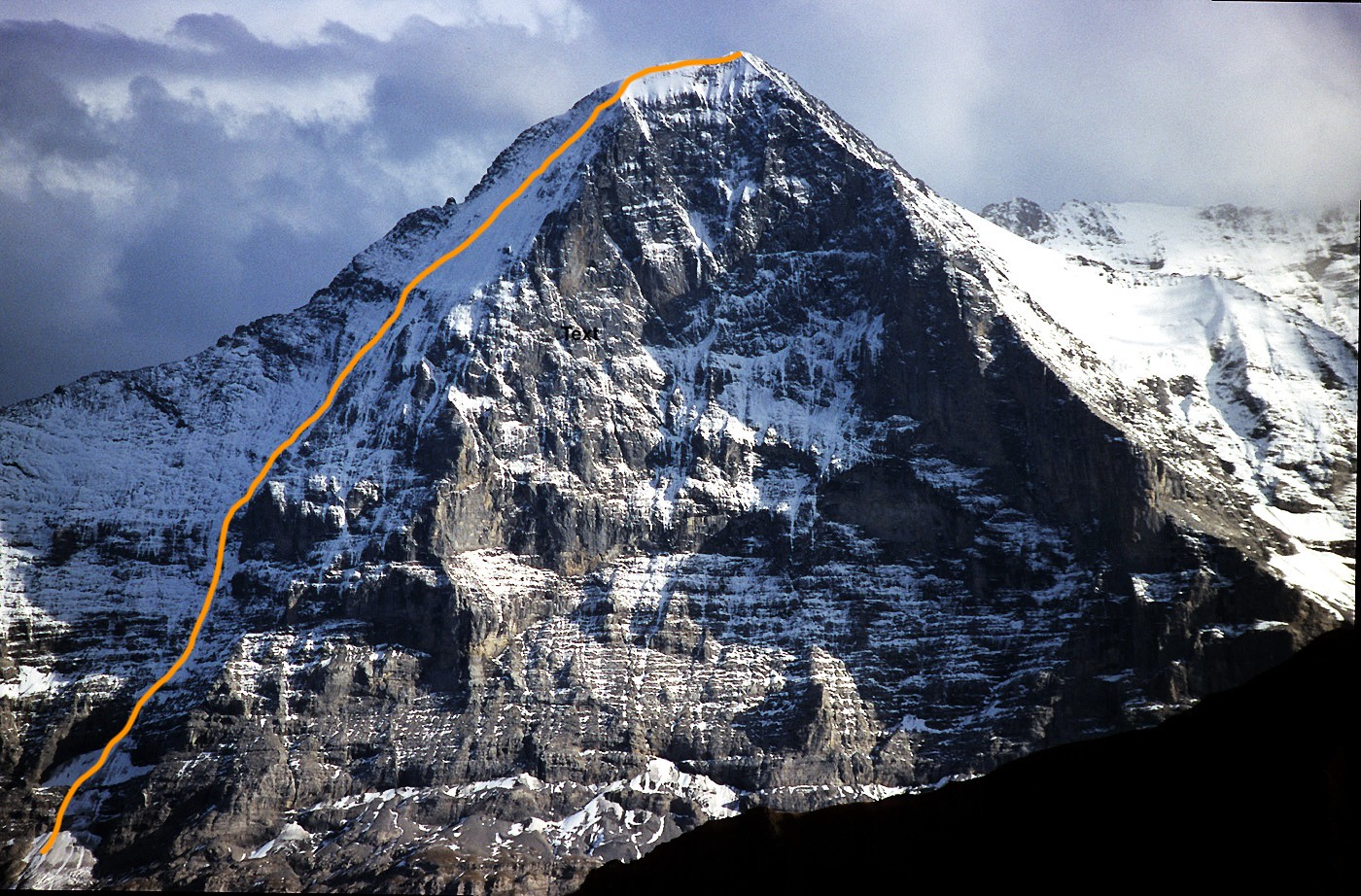 Lauperroute an der Eiger-Nordwand